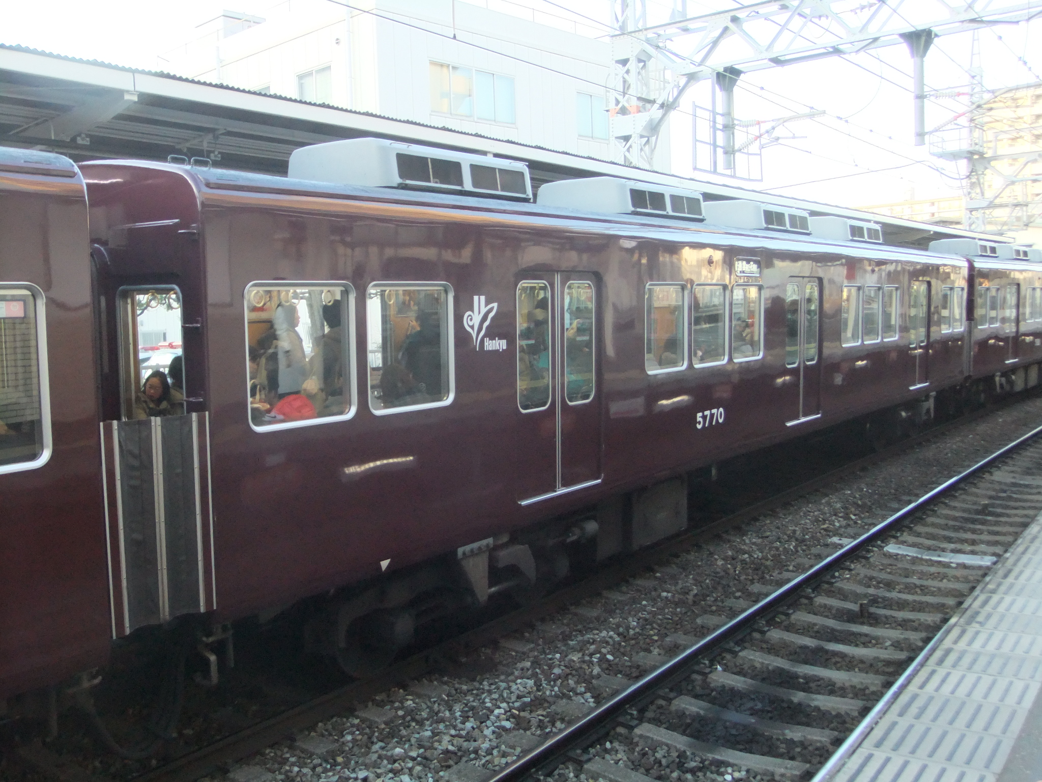 阪急電鉄5770 十三駅